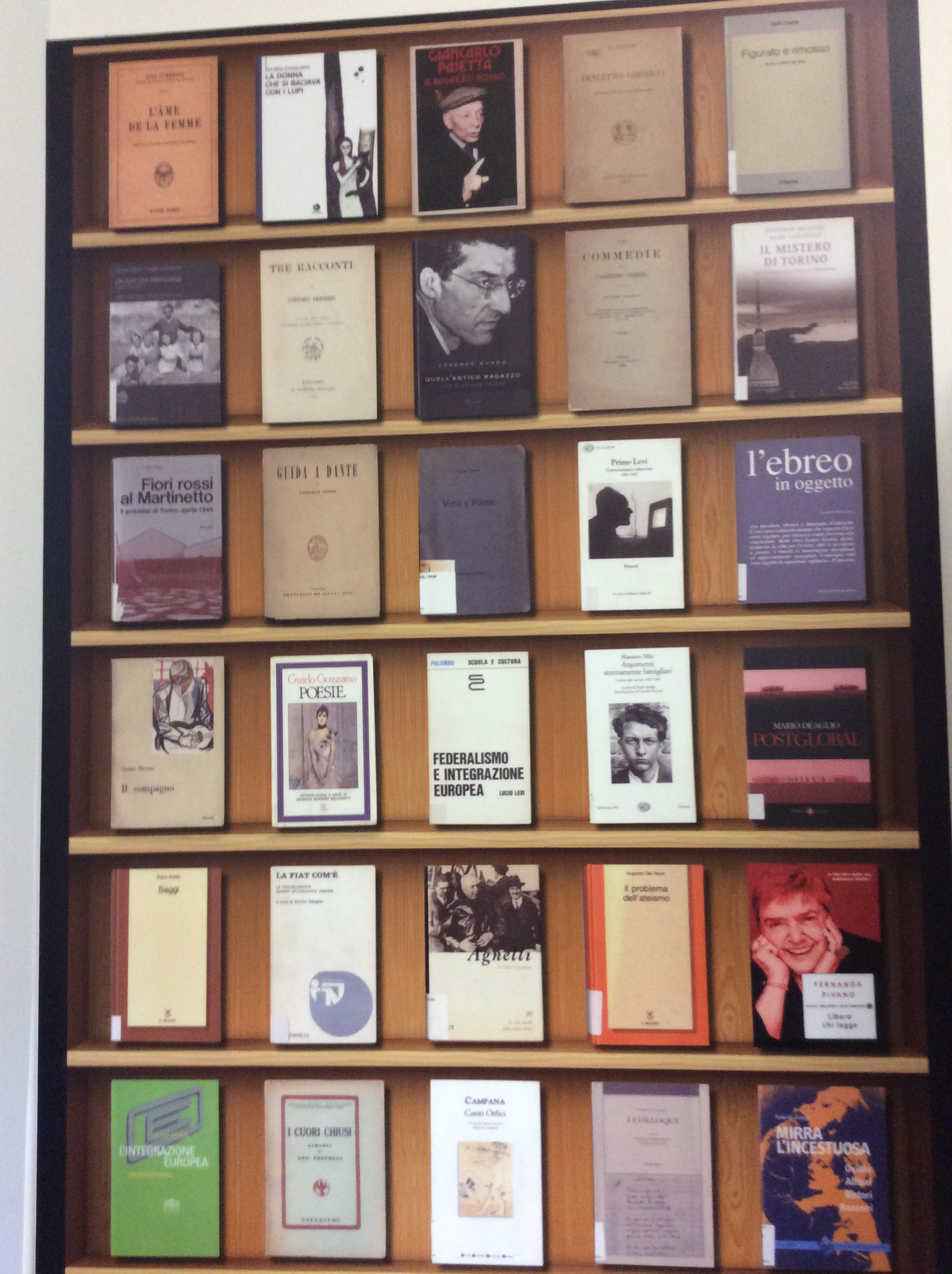 Published Books - Massimo D'Azeglio Liceo